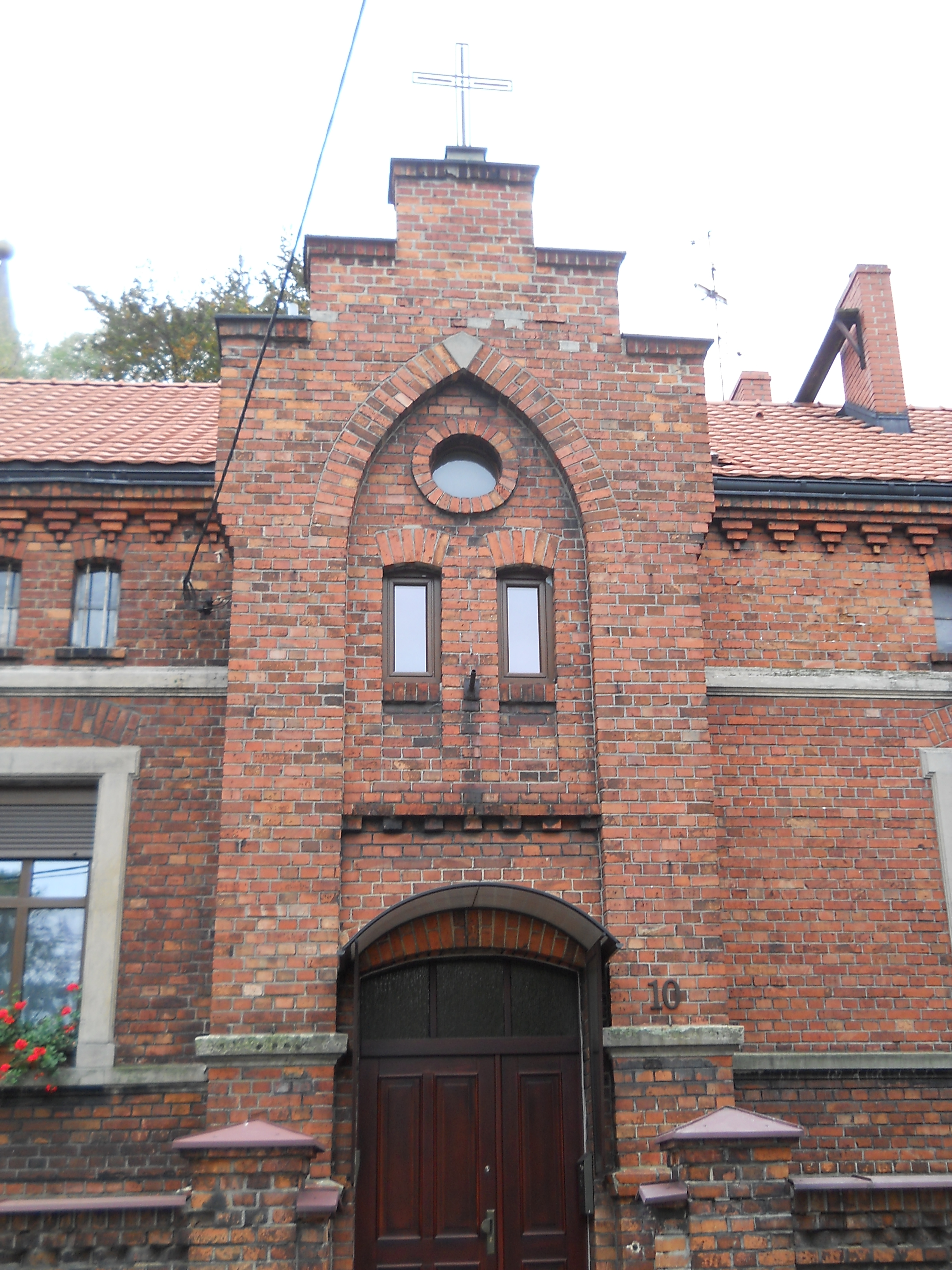 Pyskowice, ul. Poniatowskiego 10 - kościół parafialny pw. św. Mikołaja, plebania, Elementy architektoniczne (zabytek nr A/289/60 z 7.03.1960)